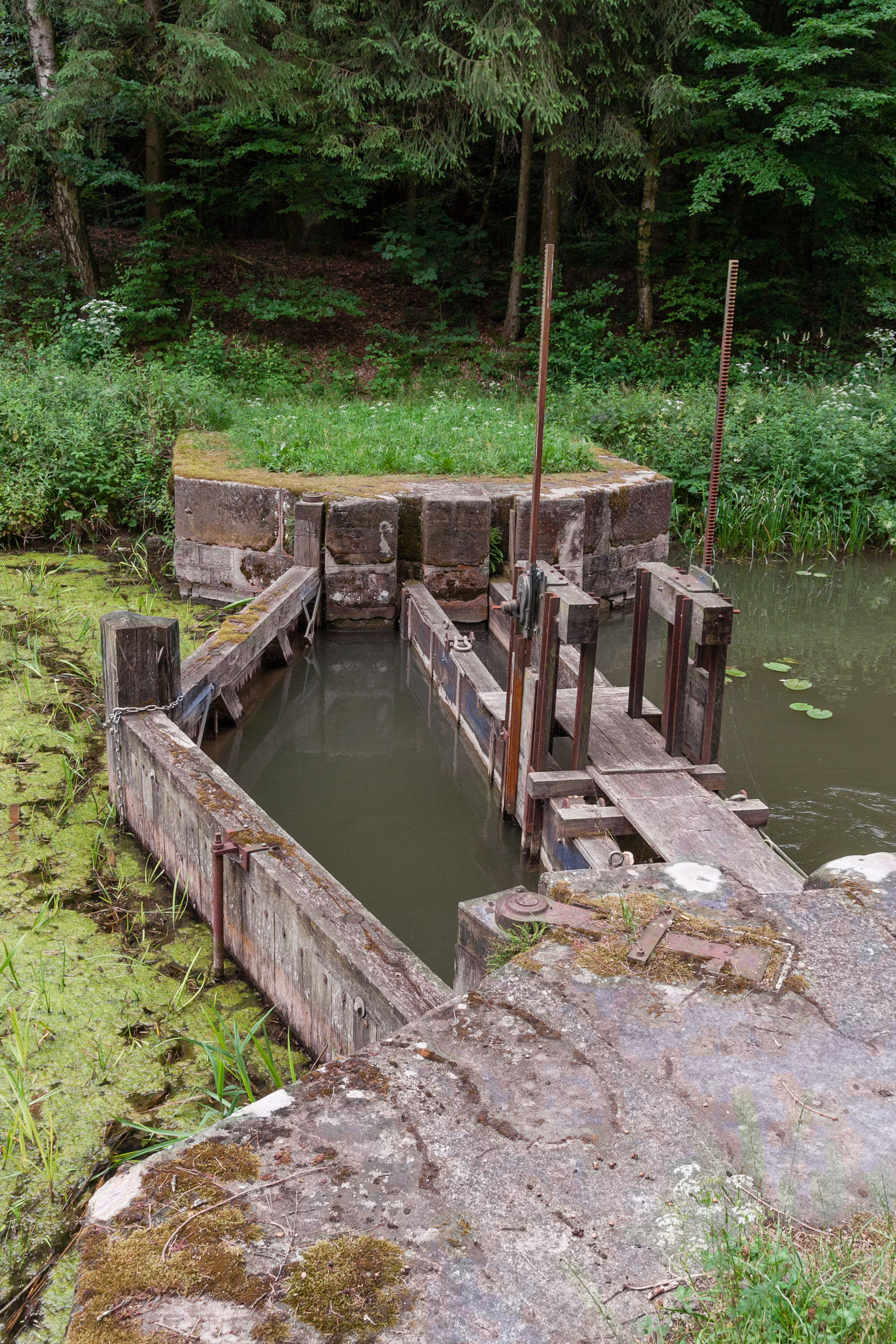 Ludwig-Donau-Main-Kanal, Sicherheitstor, Distellochdamm östlich, Burgthann